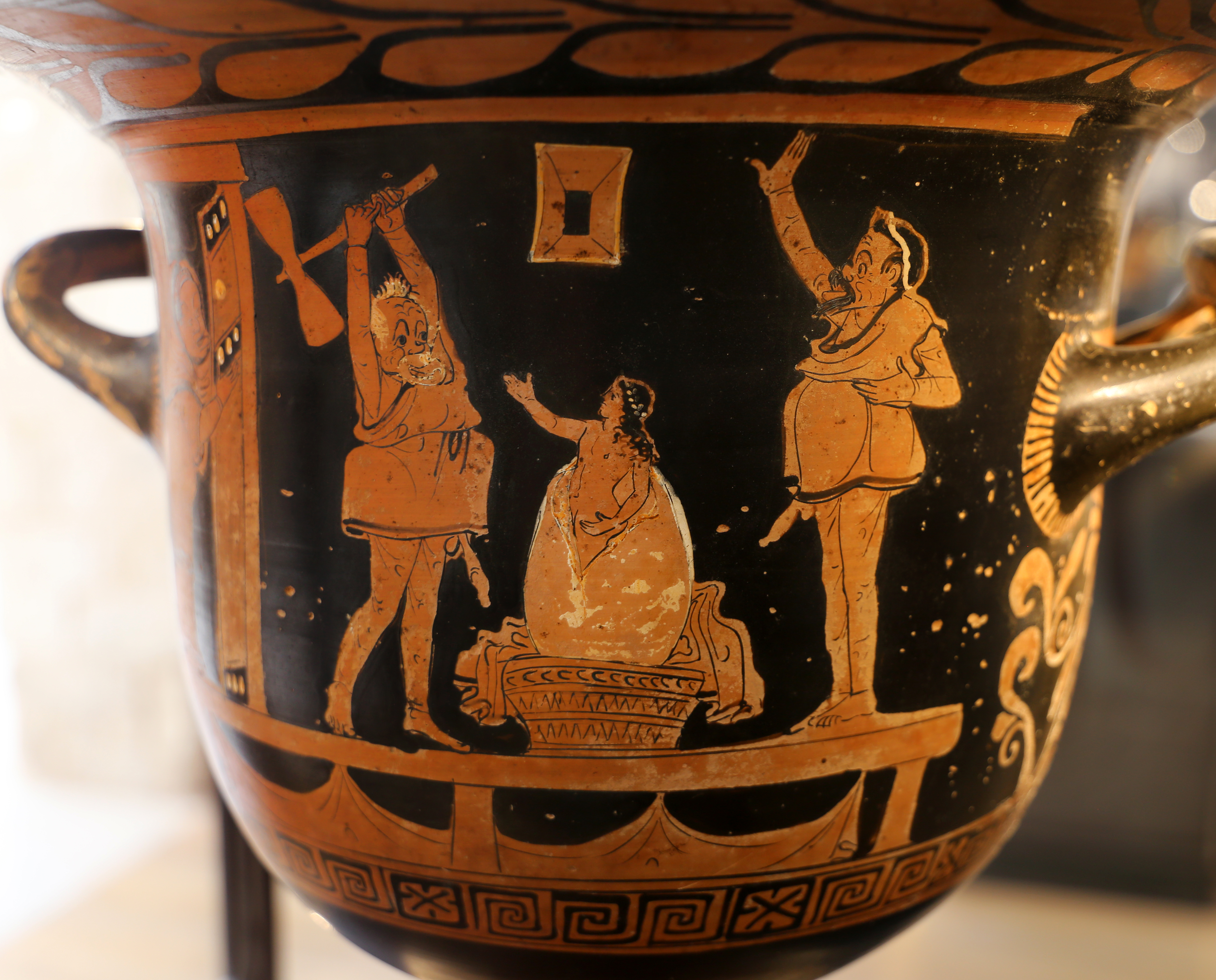 Museo archeologico e bastione di Santa Scolastica This is a photo of a monument which is part of cultural heritage of Italy.